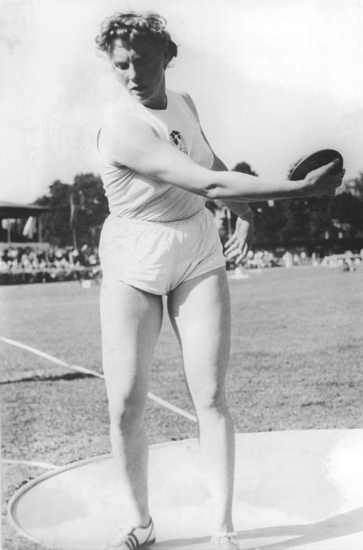 Doris Müller Zentralbild Wlocka-Wittig wen-L 20.07.1958 Deutsche Leichtathletikmeisterschaften vom 18.- 20.07.1958 in Jena. Beim Diskuswerfen der Damen siegte Doris Müller und wurde damit Deutscher Meister.